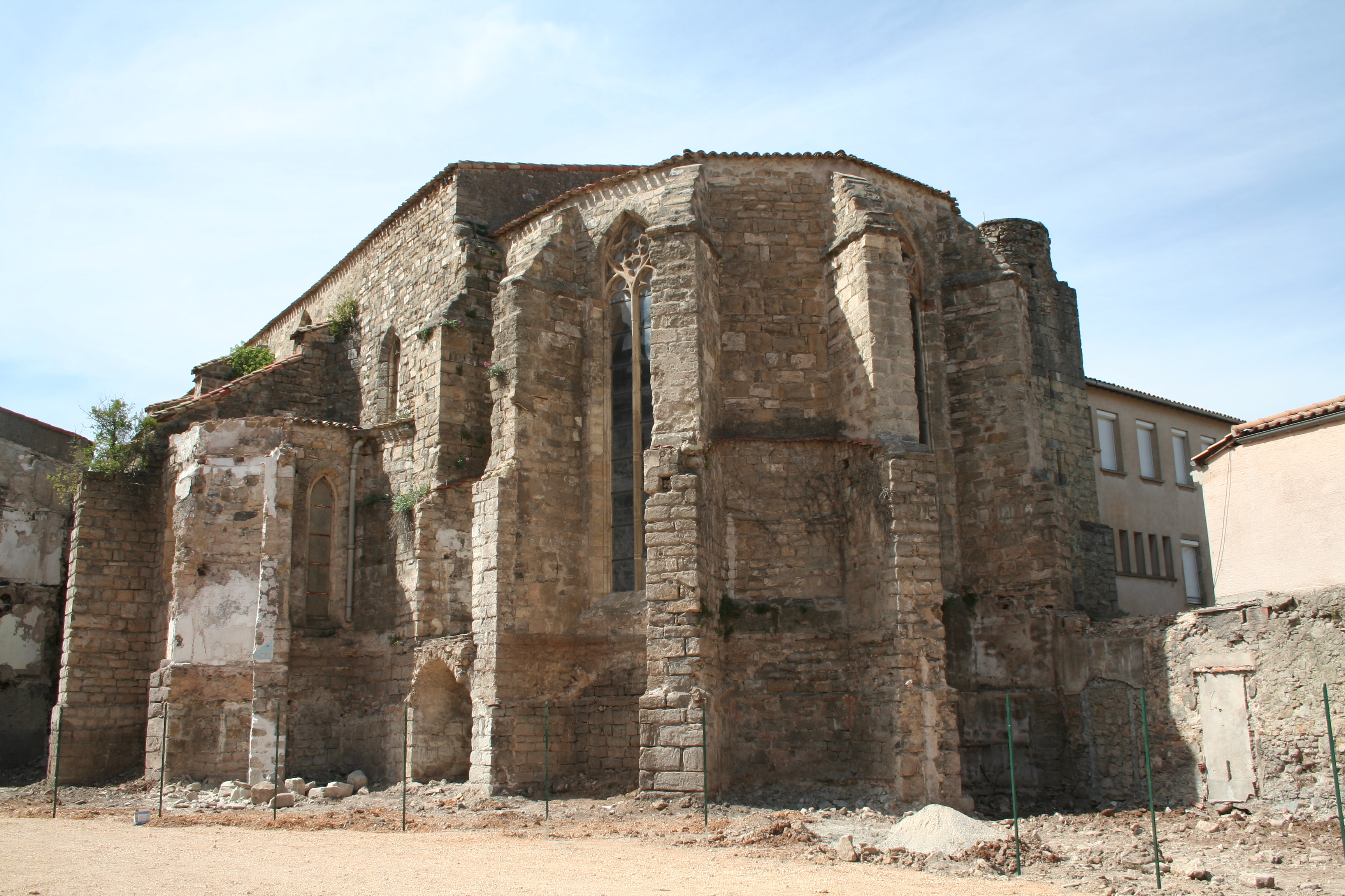 Clermont-l'Hérault (Hérault) - Chevet de la chapelle des Dominicains.